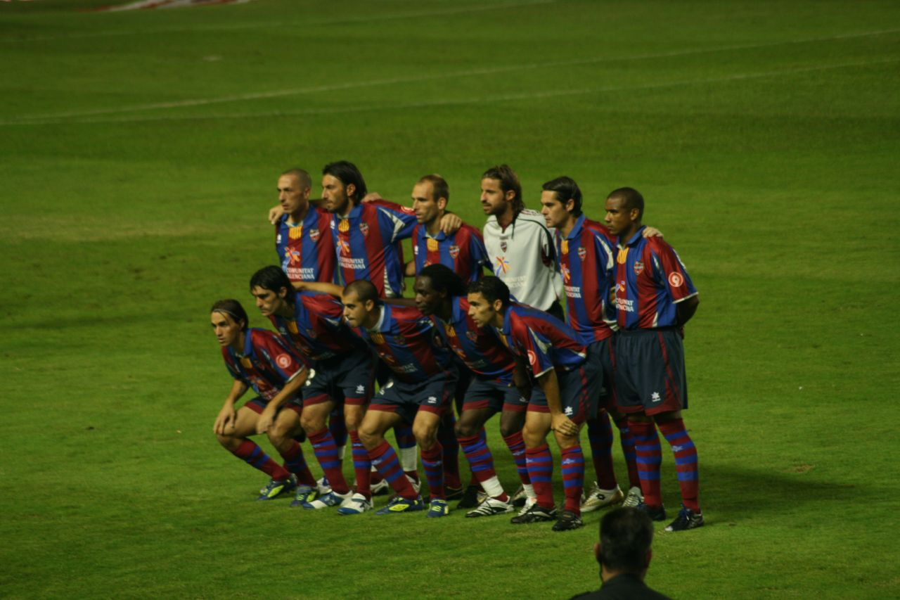 Levante UD vs FC Barcelona